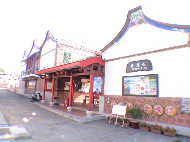 中國青年救國團墾丁青年活動中心住宿櫃臺。